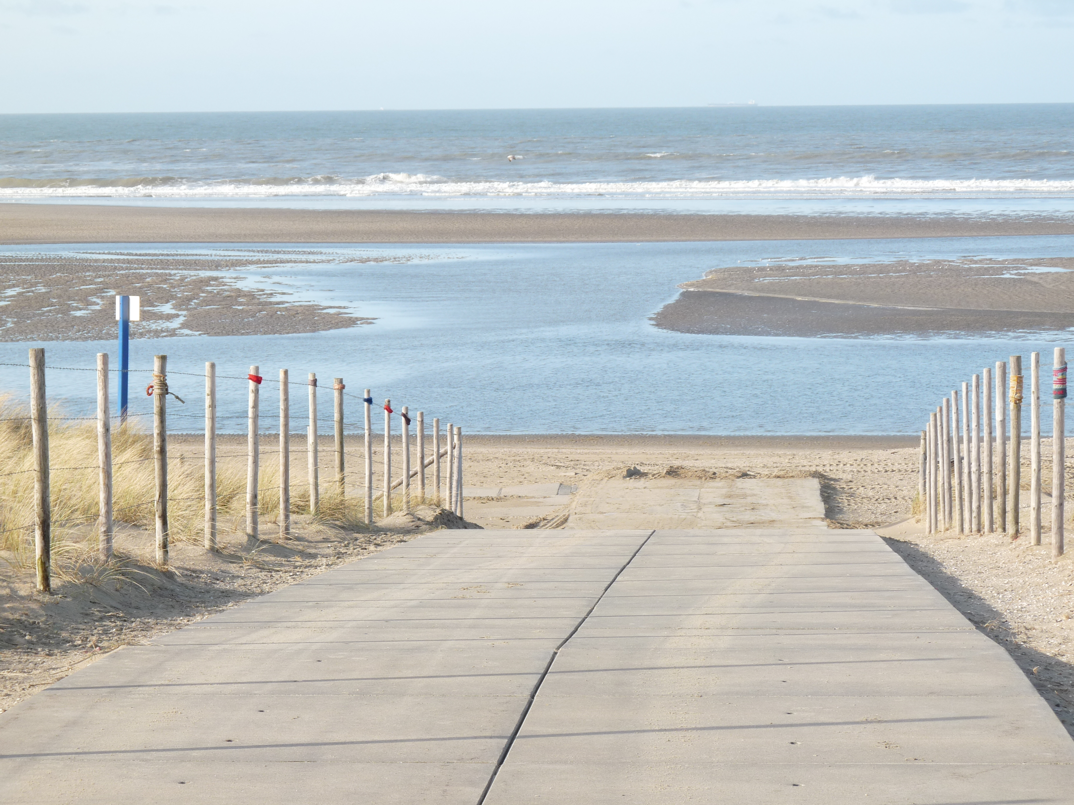 Zandmotor na de januari 18 2018 storm. Er is een nieuwe doorbraak richting ter hoogte van strandslag 1